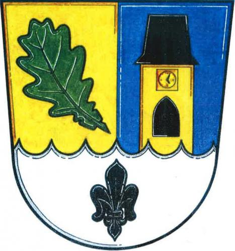 znak,Dubné , okres České Budějovice